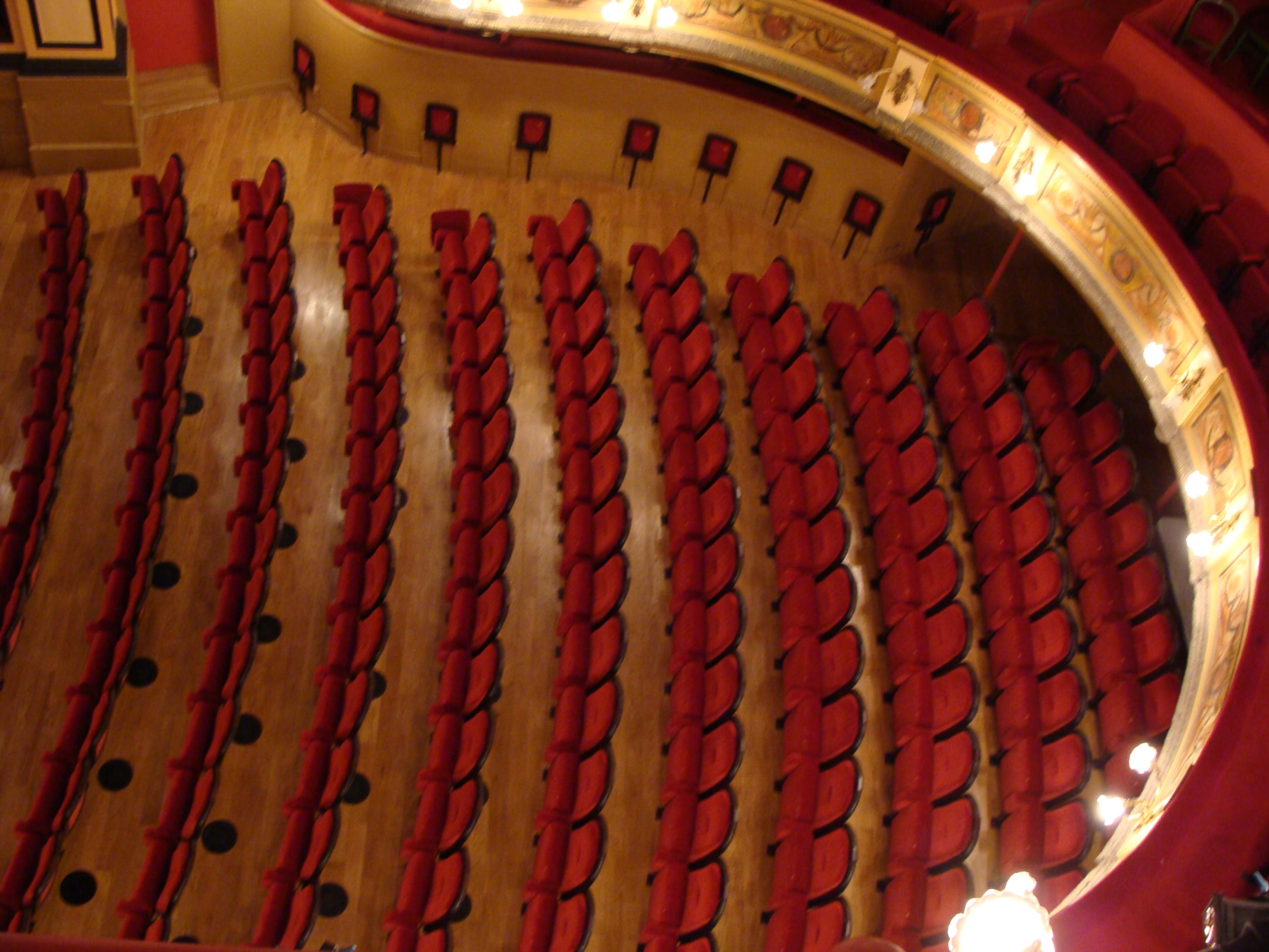 Parterre vu du poulailler de la salle à l'italienne du Théâtre municipal de Douai, Nord, France.